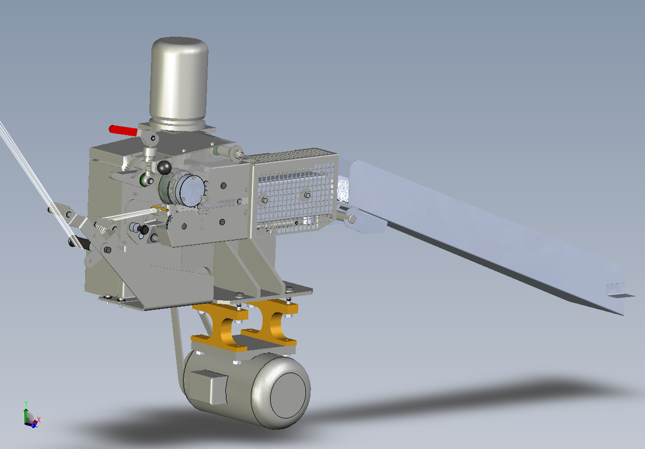 Stauchkammer Twinrollbox